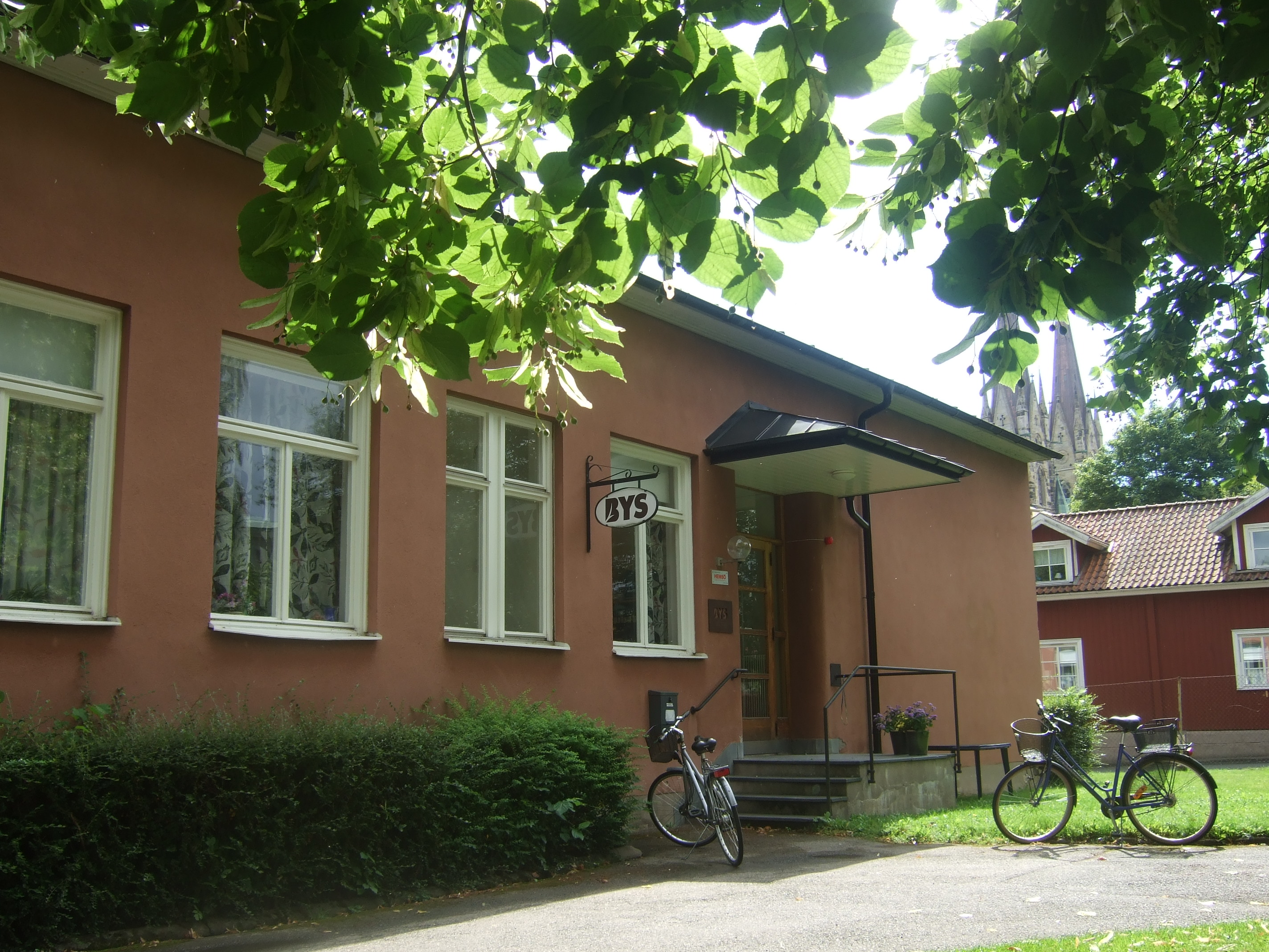 Biologiska Yrkeshögskolan i Skara, kontor